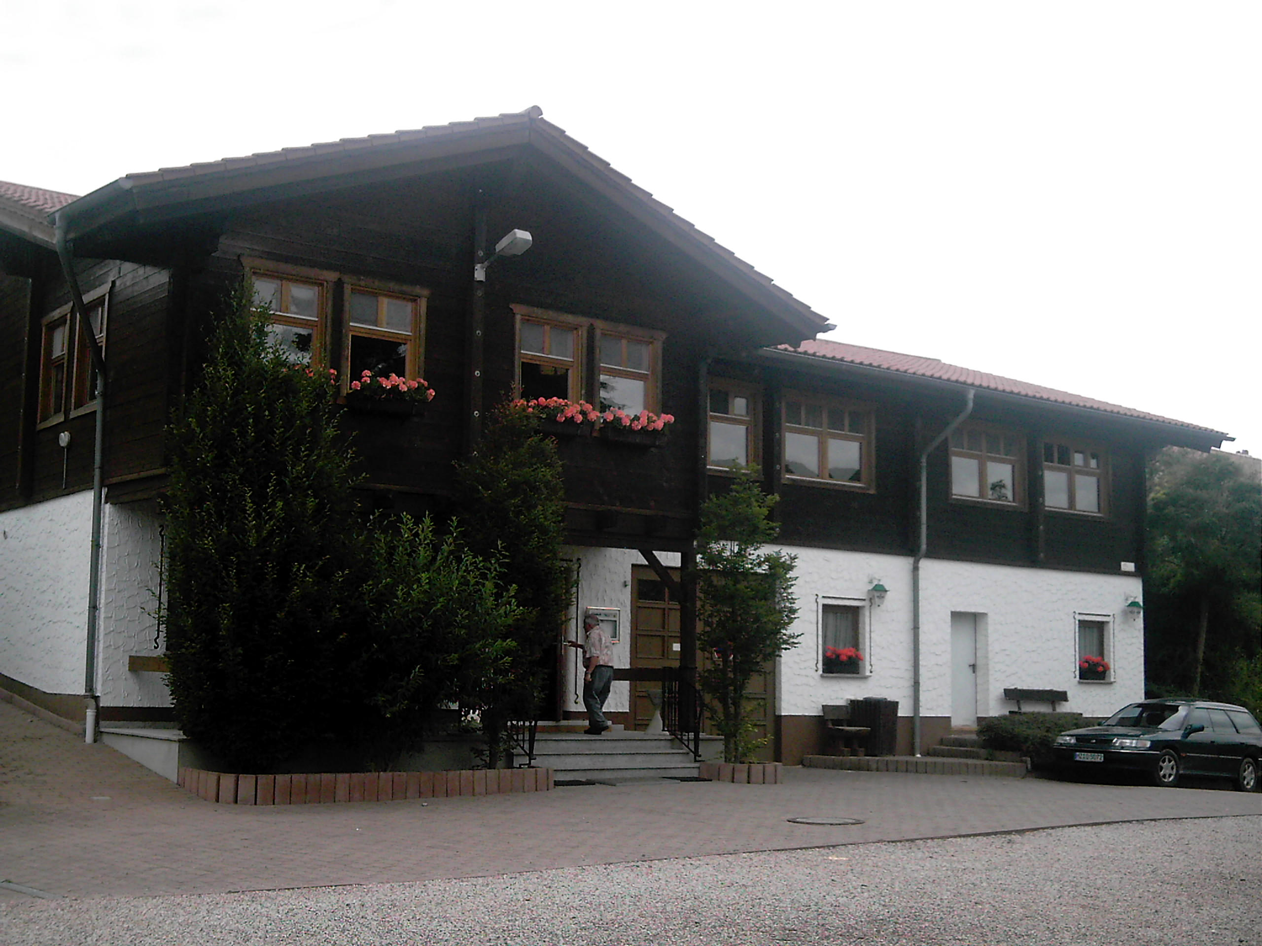 Die Speisegaststätte Bürgerhaus in Würzweiler in der Pfalz in Rheinland-Pfalz (Deutschland)